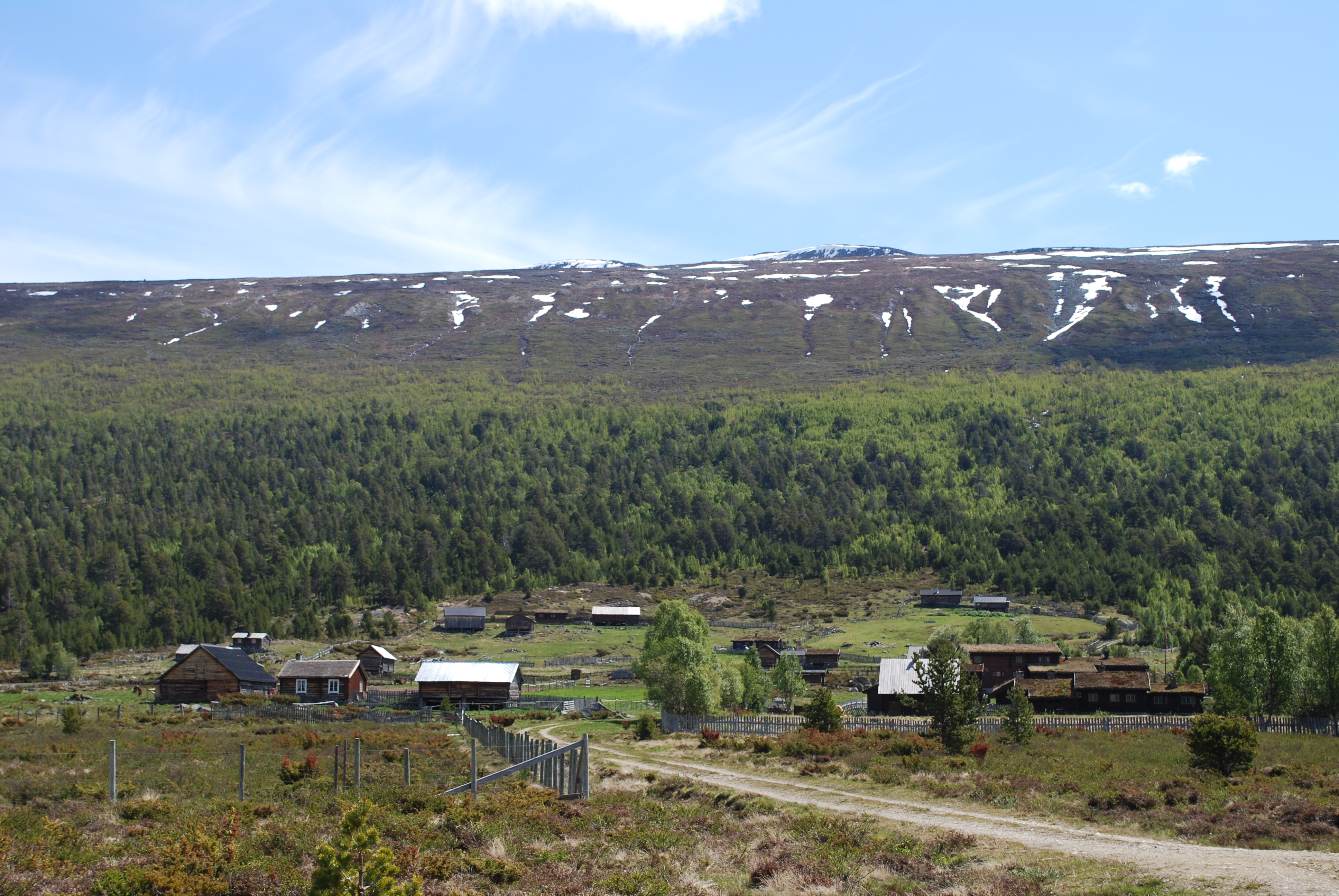 Turistforeningens Sota Sæter i Skjåk kommune i Oppland, med toppen av Nordre Sothogget i bakgrunnen.